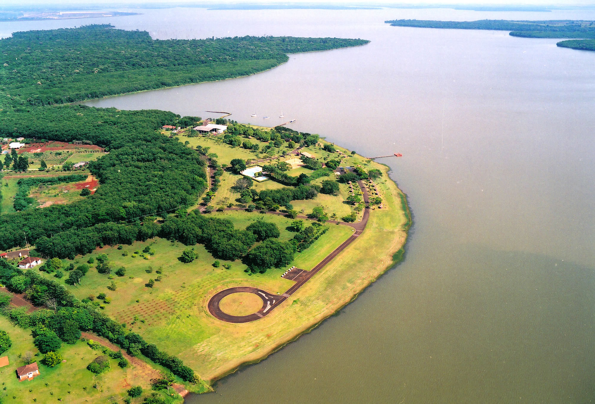 Vista aérea de parte de la reserva de Itaipú, Foz do Iguaçu